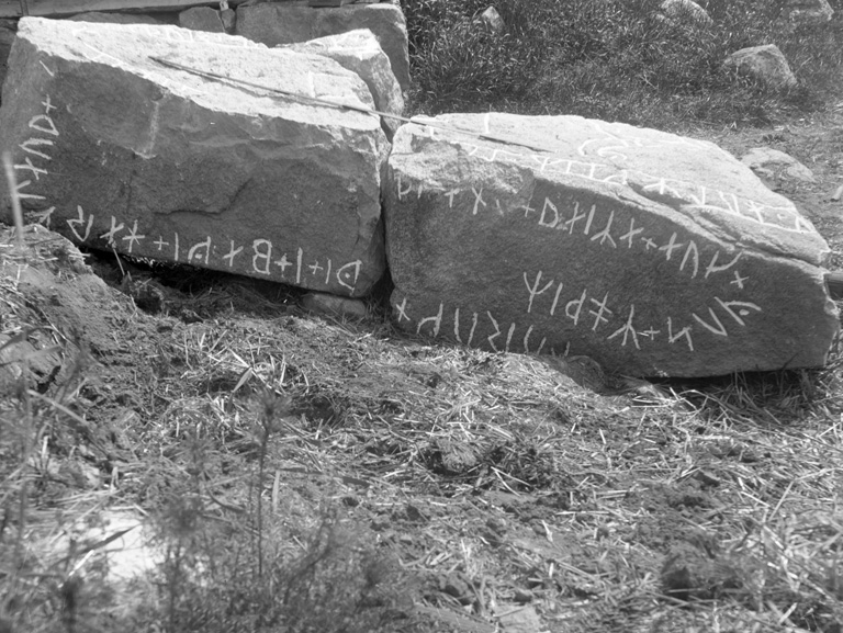 Liggande, trasig runsten, från västra sidan.